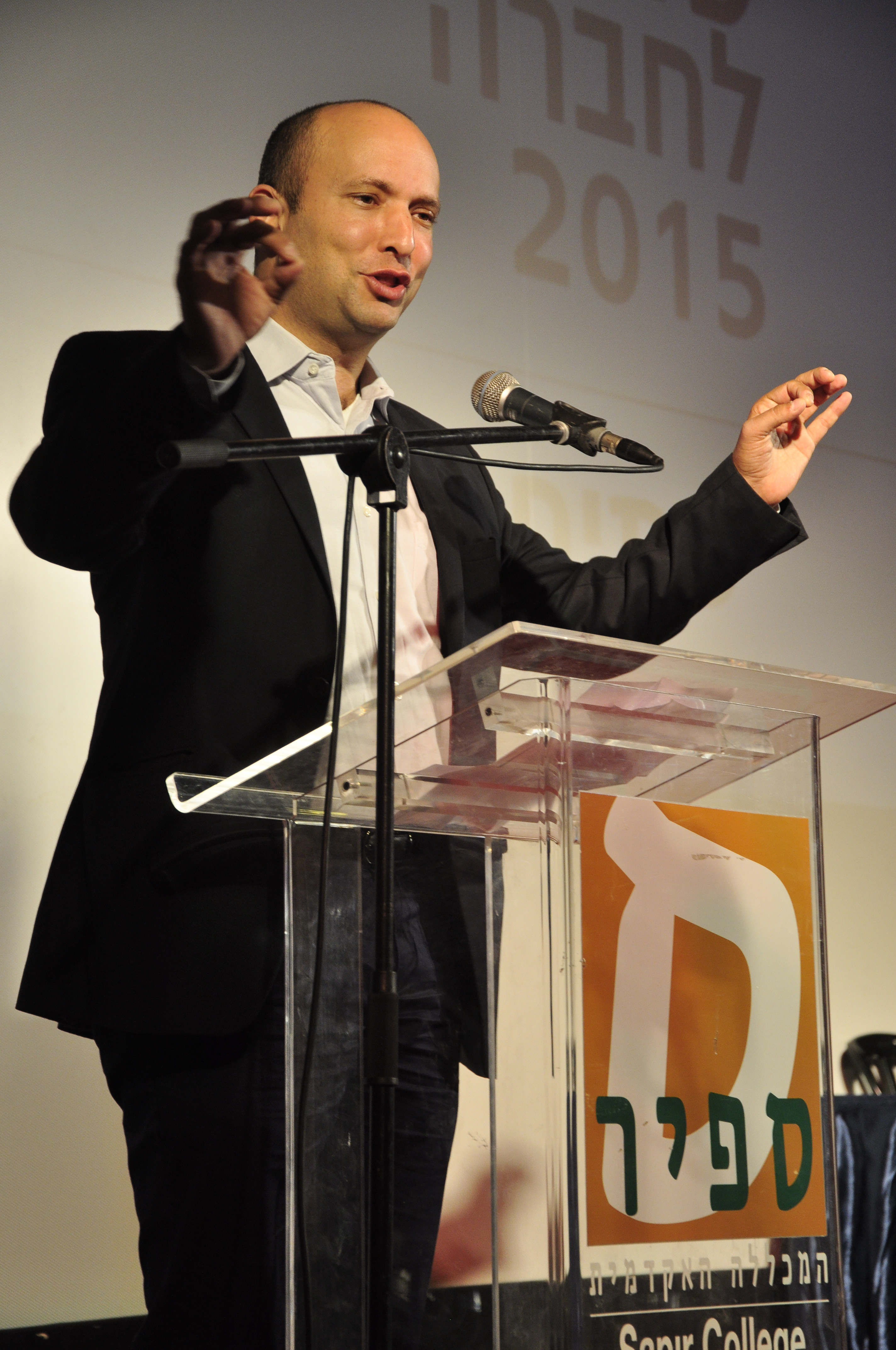 כנס שדרות לחברה במכללה האקדמית ספיר ובעיר שדרות 2015